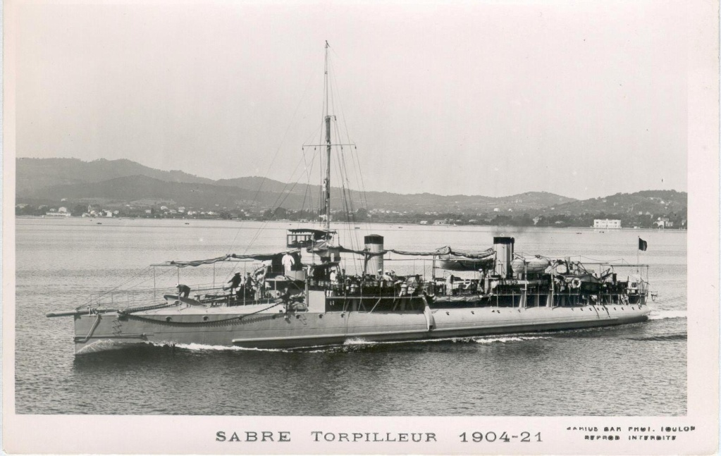 Contre-torpilleur français : Sabre